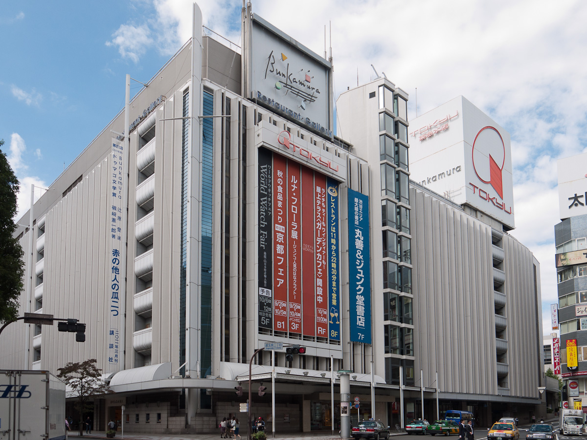 東急百貨店本店、東京都渋谷区道玄坂2丁目。